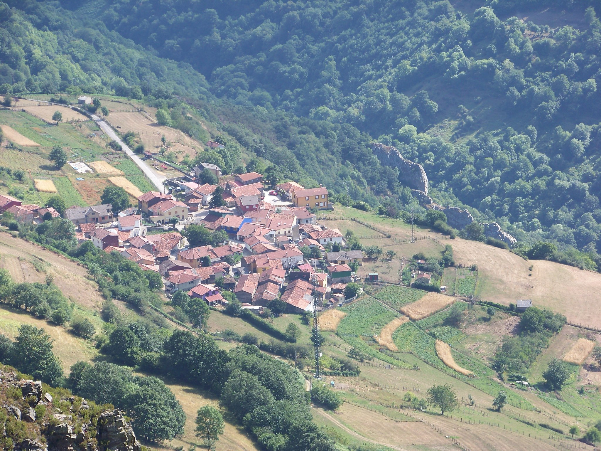 Llanos de Somerón, vista desde las cumbres del Cordal de Llanos.